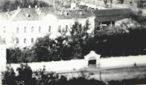 Самарский архиерейский дом